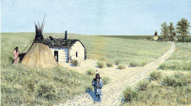 Fort Totten Trail.